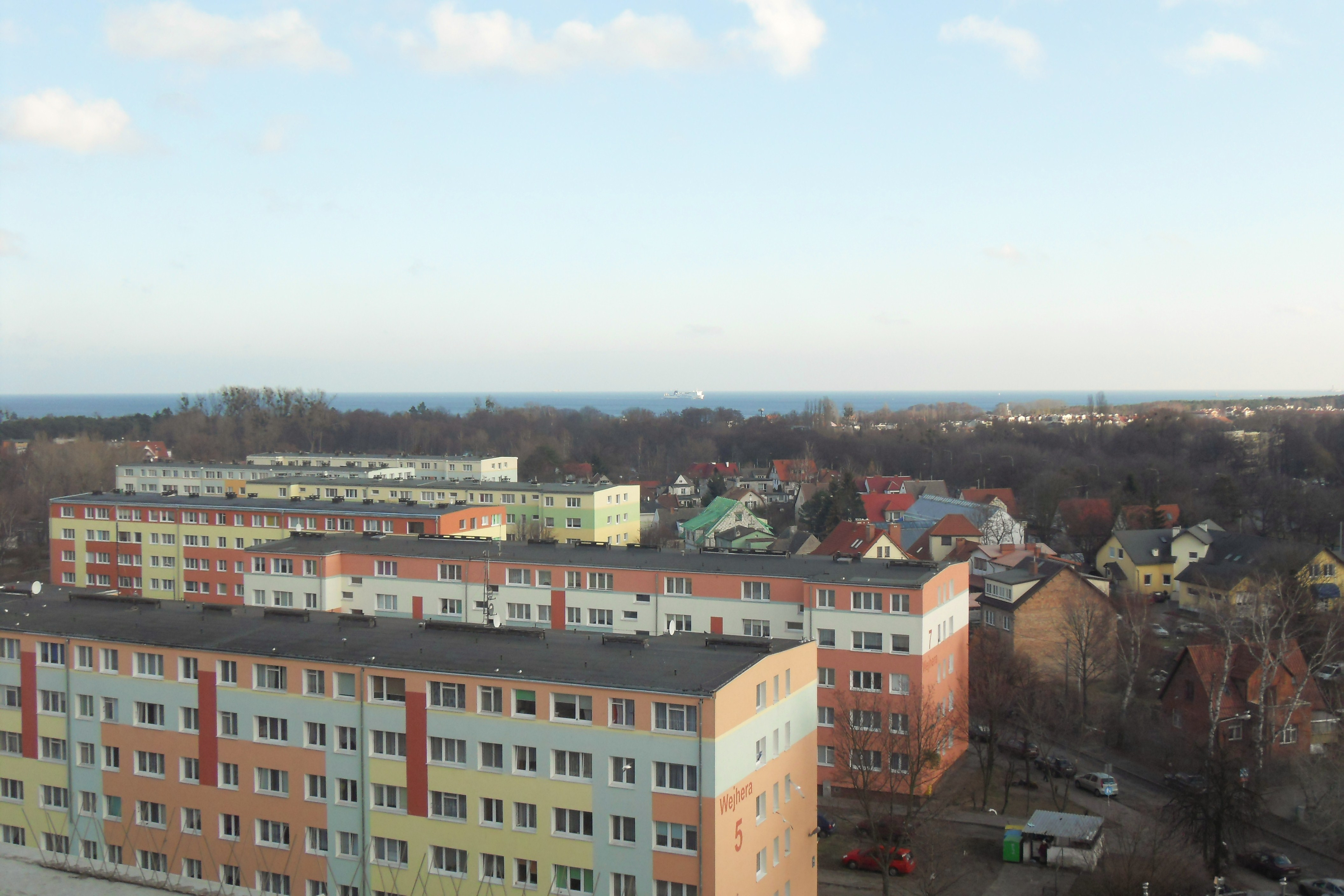 Gdańsk. Osiedle Wejhera.